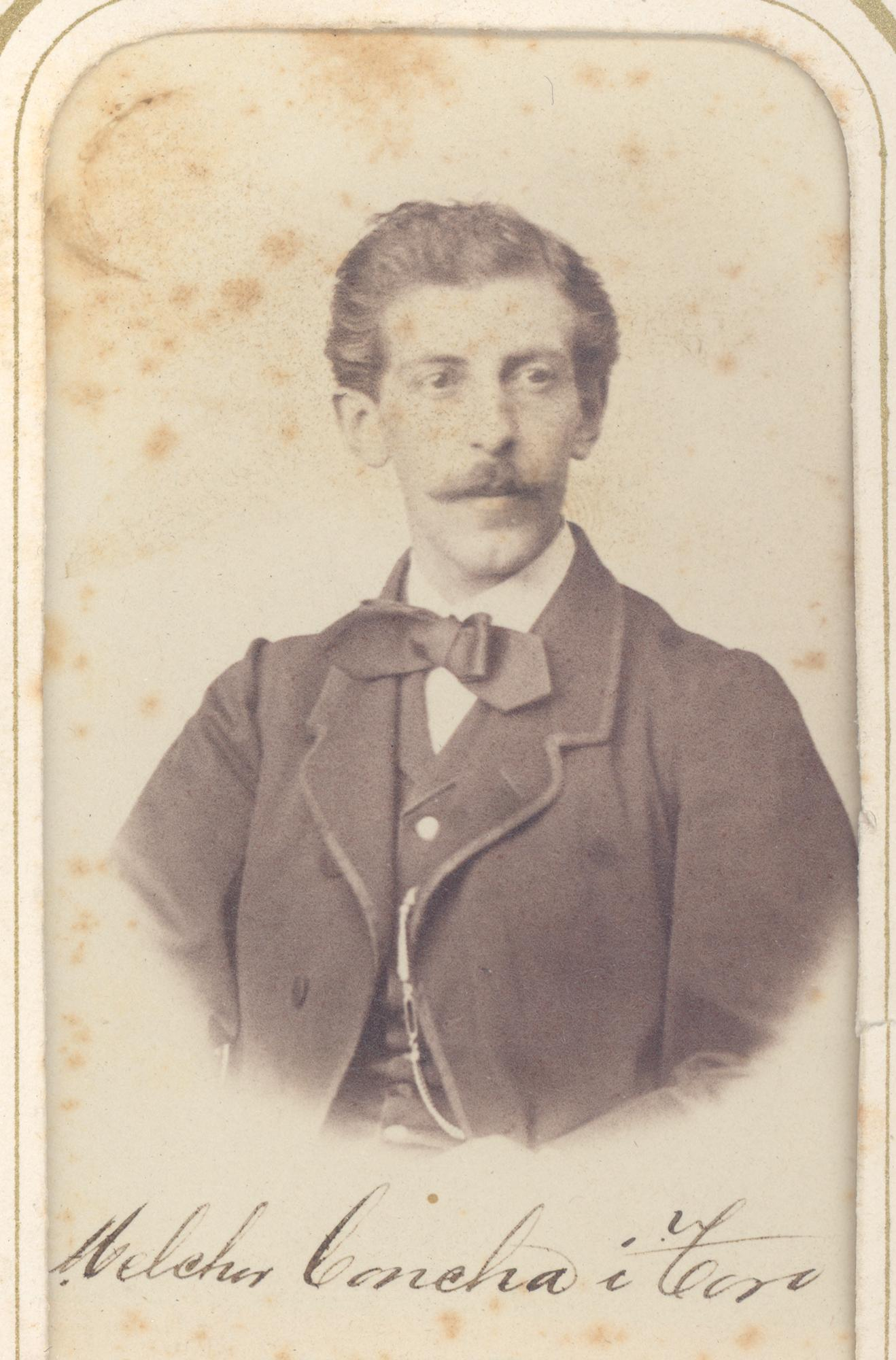 Melchor de Santiago Concha y Toro —adoptó el nombre de Melchor de Concha y Toro mientras fue senador—1 (Santiago, 10 de octubre de 1833 – ibídem, 21 de julio de 1892) fue un empresario, abogado y político chileno, VII marqués de Casa Concha.